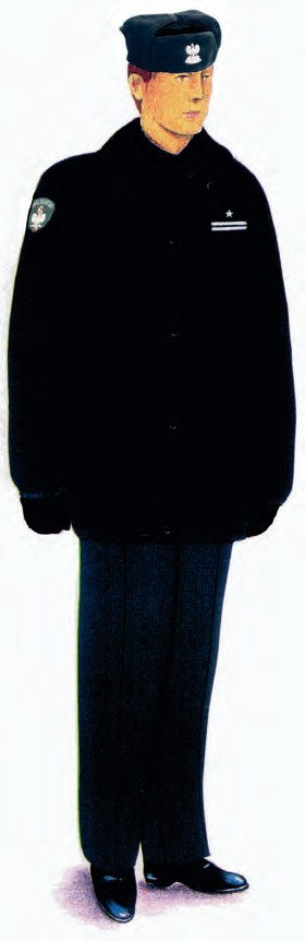 Ubiór wyjściowy funkcjonariuszy noszących umundurowanie SP z kurtką zimową nieprzemakalną i z czapką futrzaną.